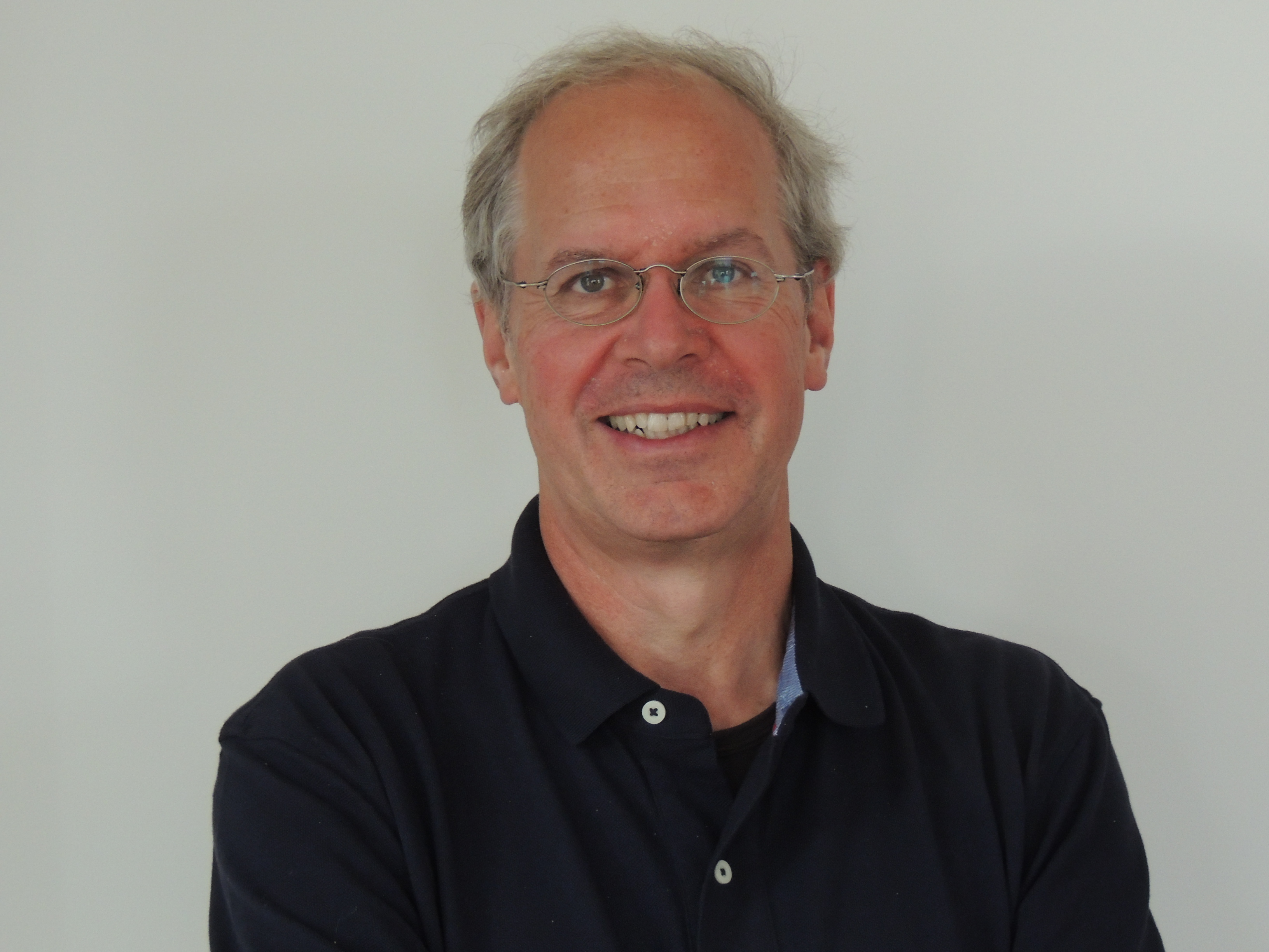 Thierry Carrel